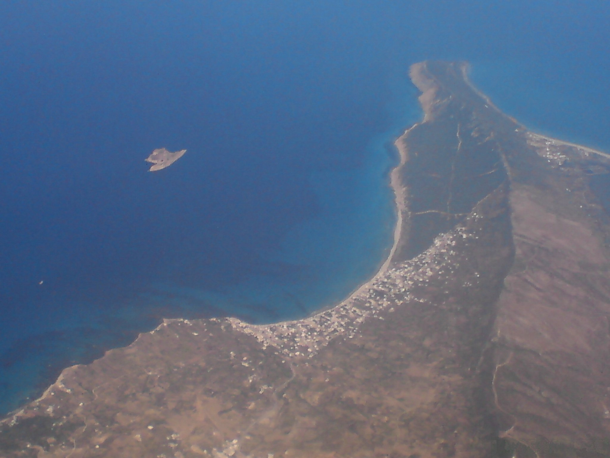 Vue aérienne de Raf Raf plage et de l'île Pilau